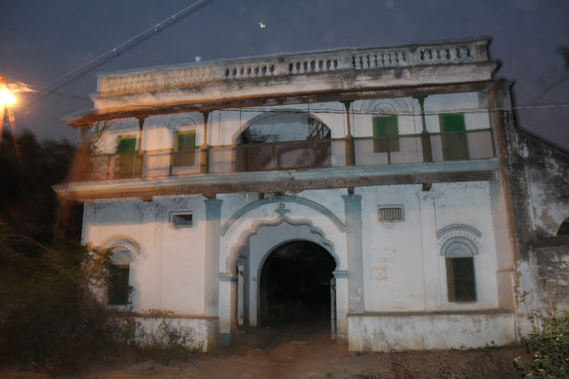 Kaapu vaari mEda in Kamma vaari palemu in Nandigama Mandal, Krishna Dt, AP, India